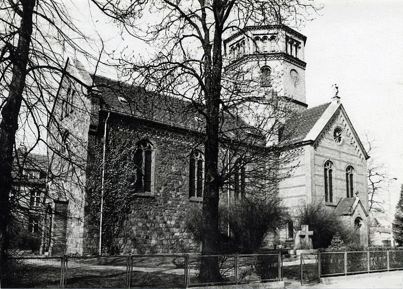 Friedenskirche (Dorfkirche Niederschönhausen). Auf diesem Foto ist – anders als bei anderen Fotos – das Feldsteinmauerwerk des Langhauses gut zu erkennen, also das spätromanische Kennzeichen (für einen Bau um 1250).